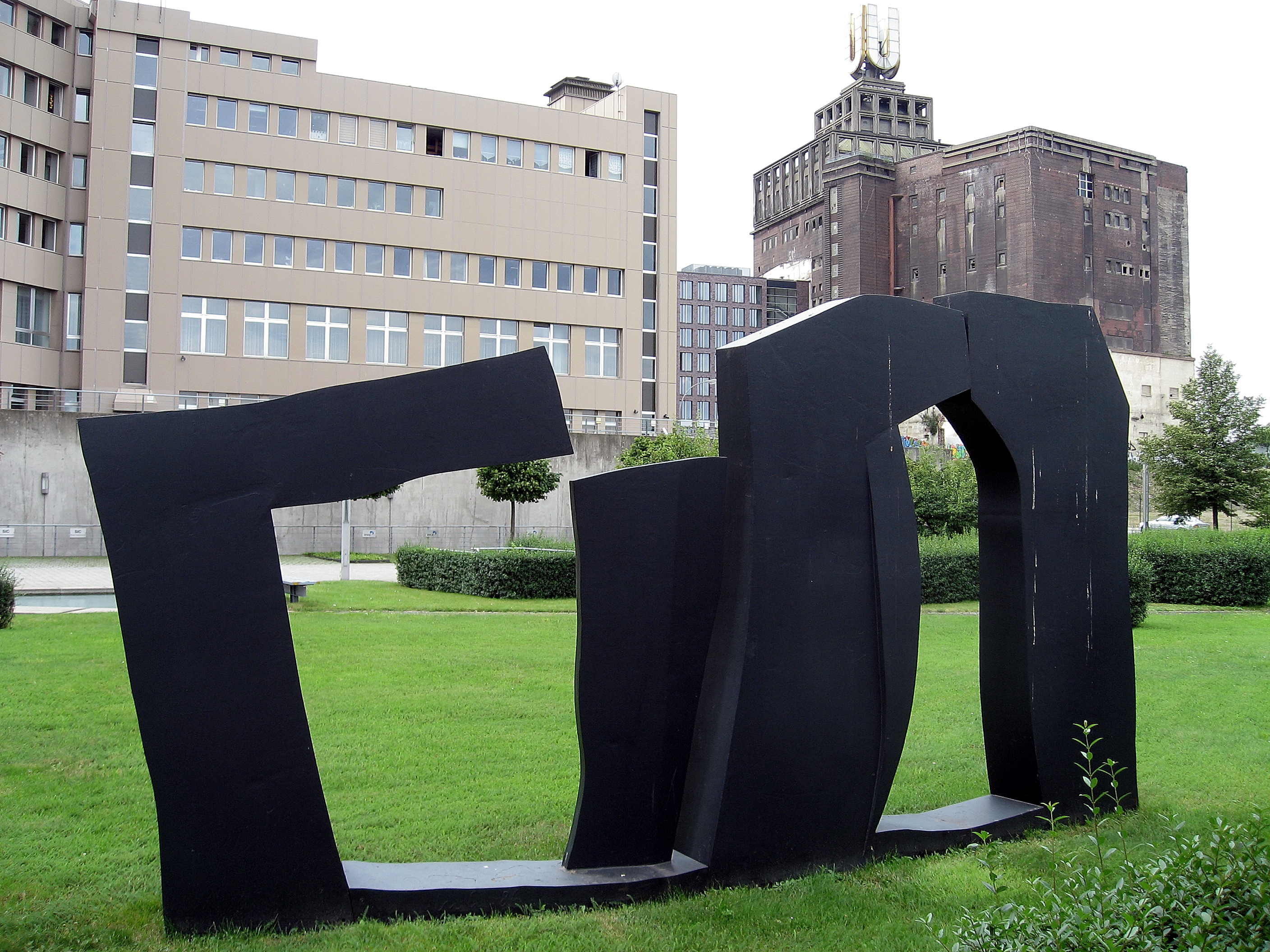 Dortmund, frühere Union-Brauerei, Brau- und Brunnen. Im Vordergrund: Pit Kroke, Lonos, Stahl gestrichen 1986, 300 X 585 X 40 cm